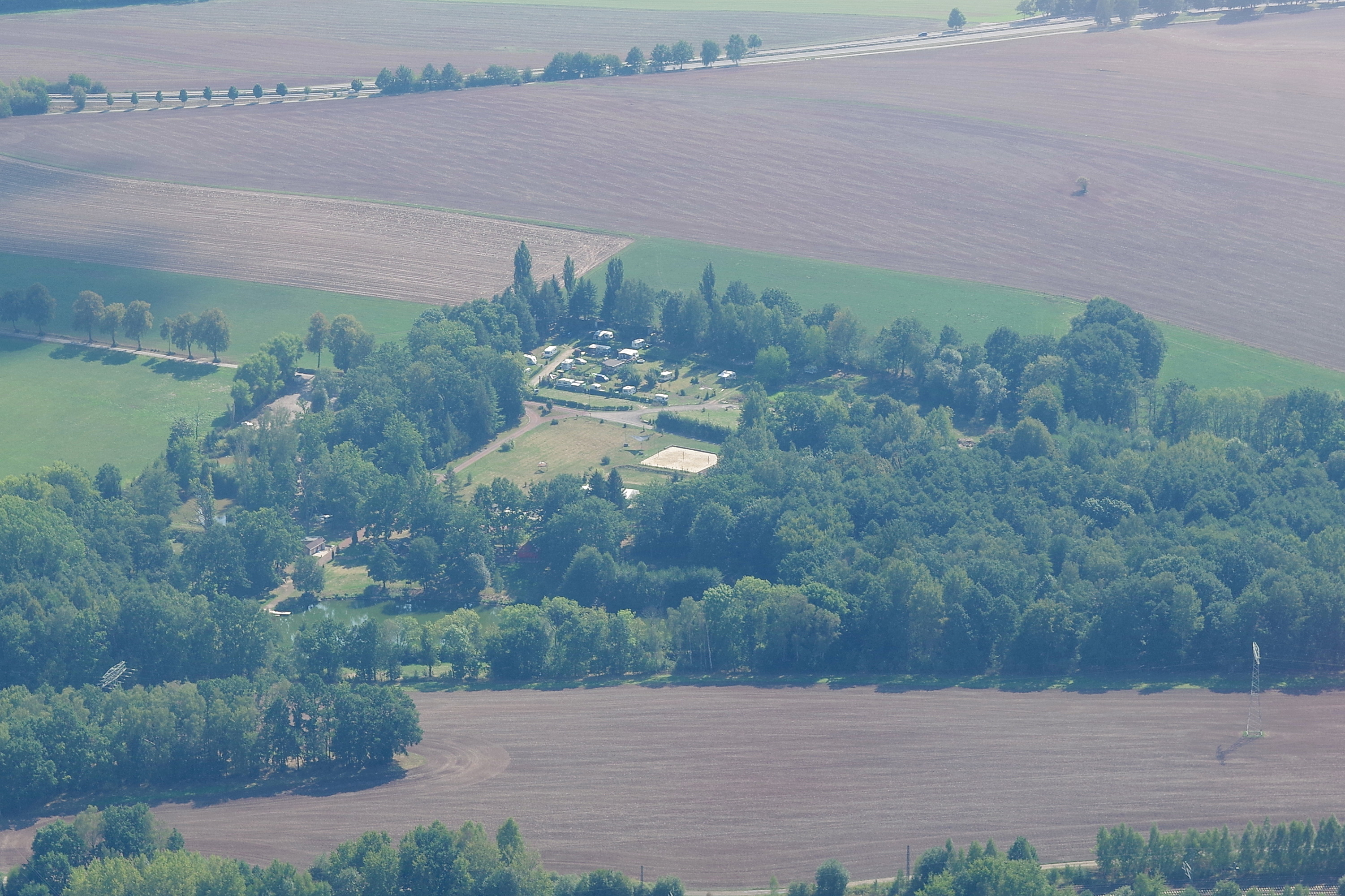 Naturbad Niederwiesa